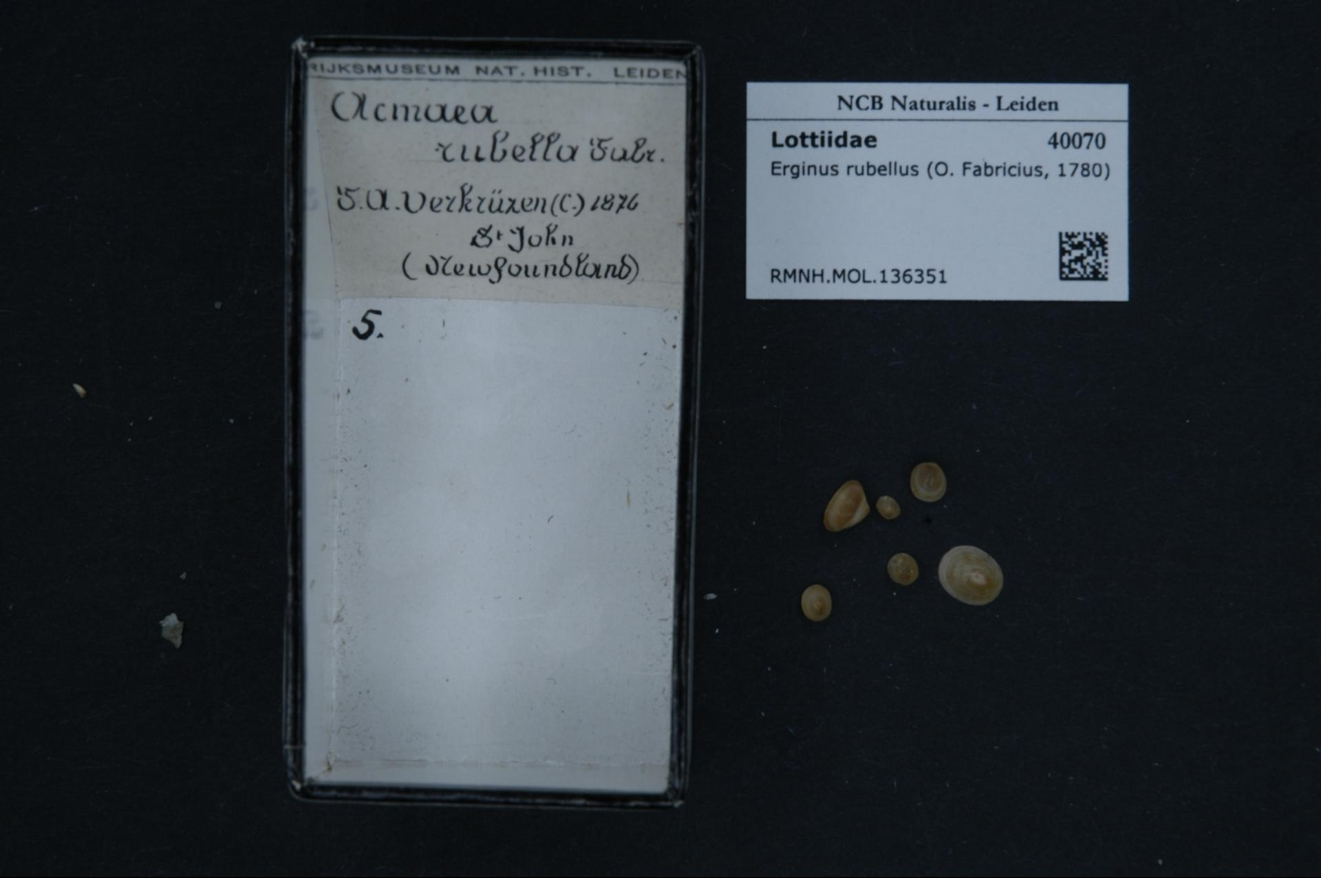 Erginus rubellus (O. Fabricius, 1780)